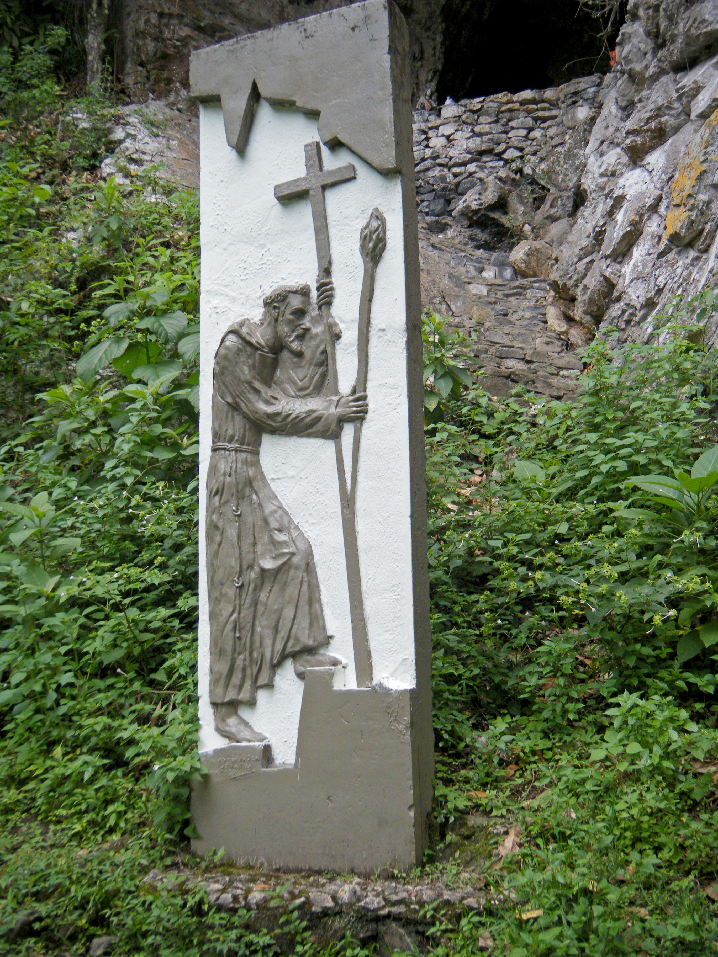 Es un monumento del misionero capuchino en Caripe, está justo al frente de la entrada de la Cueva del Guacharo. Caripe, Monagas, Venezuela.